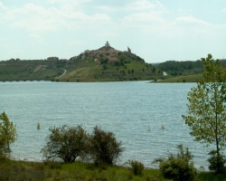 Maderuelo. Vista desde Las Hazas.